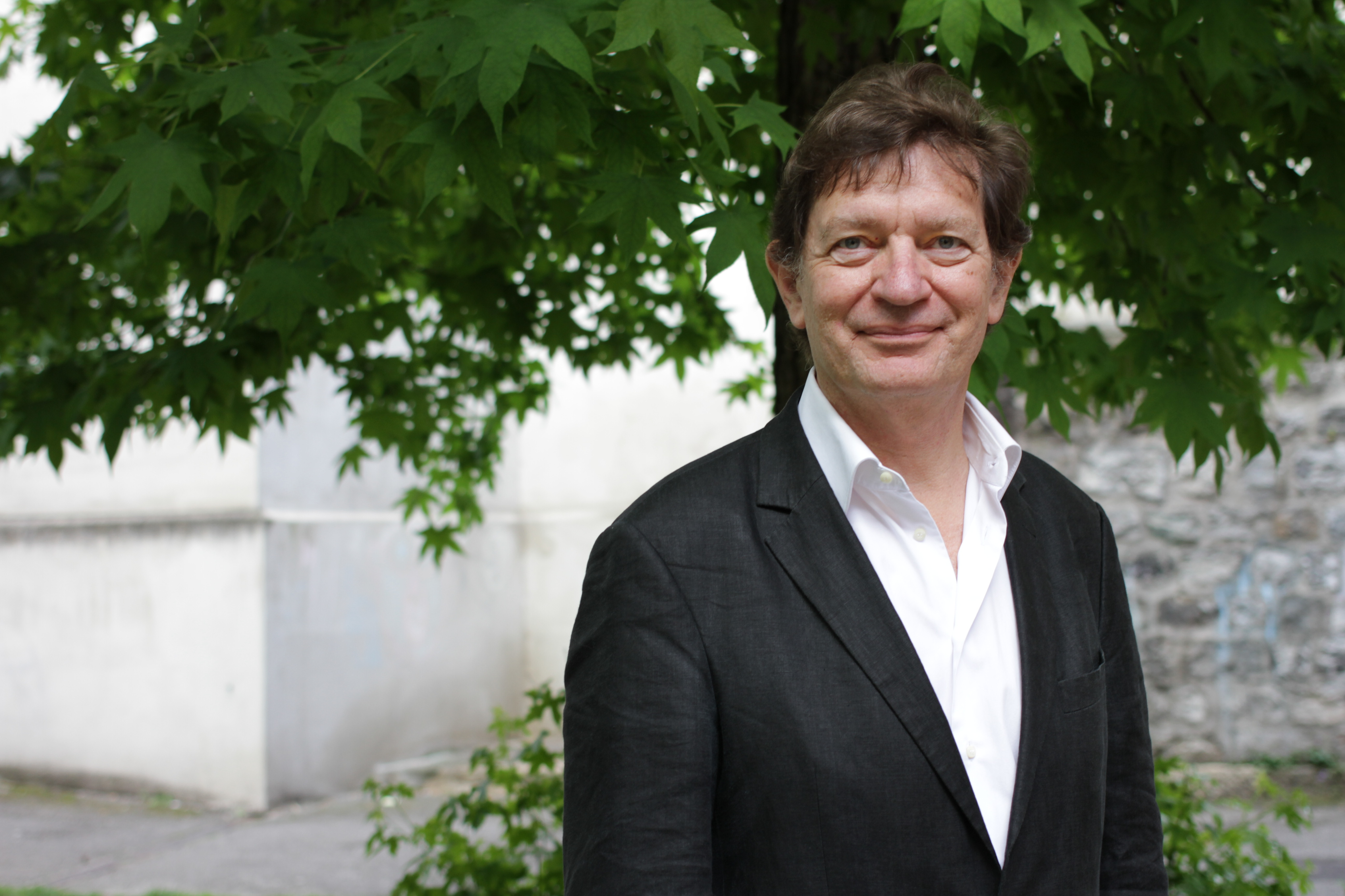 Magistrat à la Cour des comptes de Genève